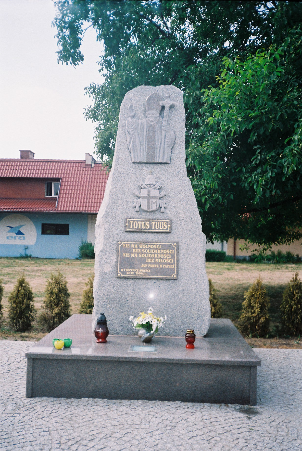 Jelcz-Laskowice - pomnik Jana Pawła II.